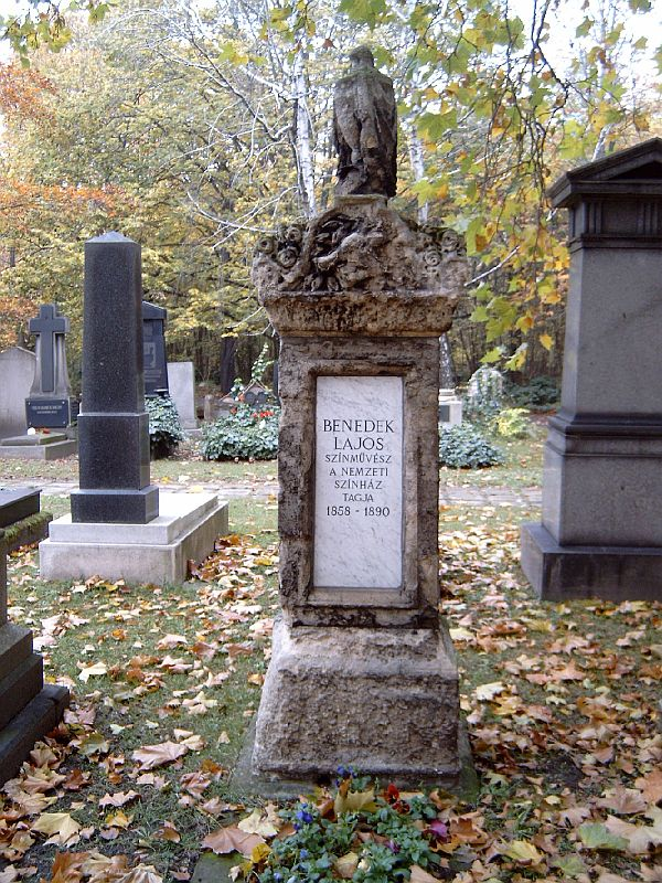 Benedek Lajos (Pest, 1858 – Budapest, 1890. december 26.) színész sírja Budapesten. Kerepesi temető: 34/1-2-26